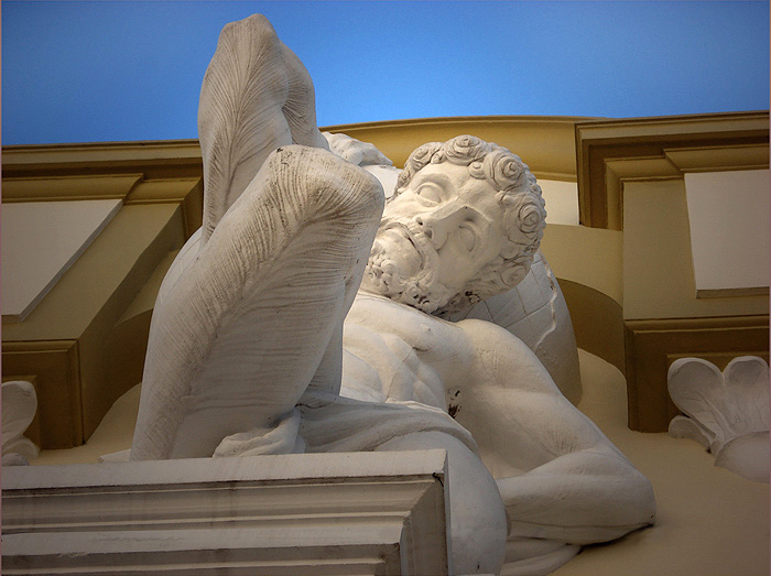 Detalhe da fachada sul do Prédio da Inspetoria da Receita Federal em Porto Alegre, Brasil.